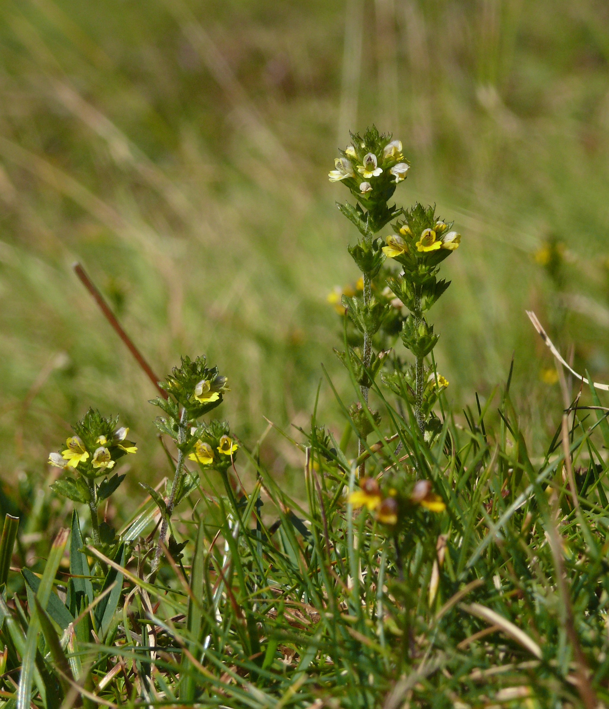 Euphrasia minima, Zillertaler Alpen, Italien